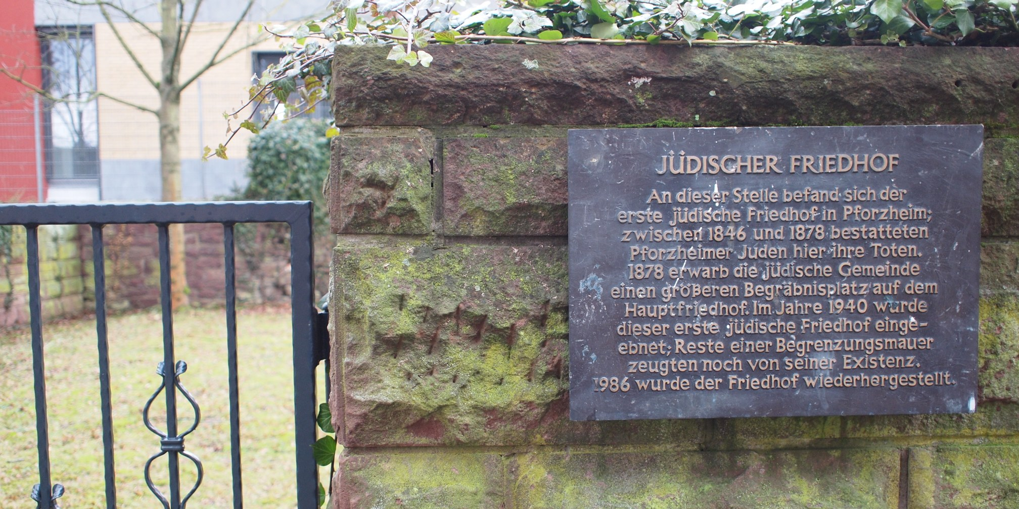 Alter jüdischer Friedhof in Pforzheim. Gedenktafel JÜDISCHER FRIEDHOF An dieser Stelle befand sich der erste jüdische Friedhof in Pforzheim; zwischen 1846 und 1878 bestatteten Pforzheimer Juden hier ihre Toten. 1878 erwarb die jüdische Gemeinde einen größeren Begräbnisplatz auf dem Hauptfriedhof. Im Jahre 1940 wurde dieser erste jüdische Friedhof einge- ebnet; Reste einer Begrenzungsmauer zeugten noch von seiner Existenz. 1986 wurde der Friedhof wiederhergestellt.